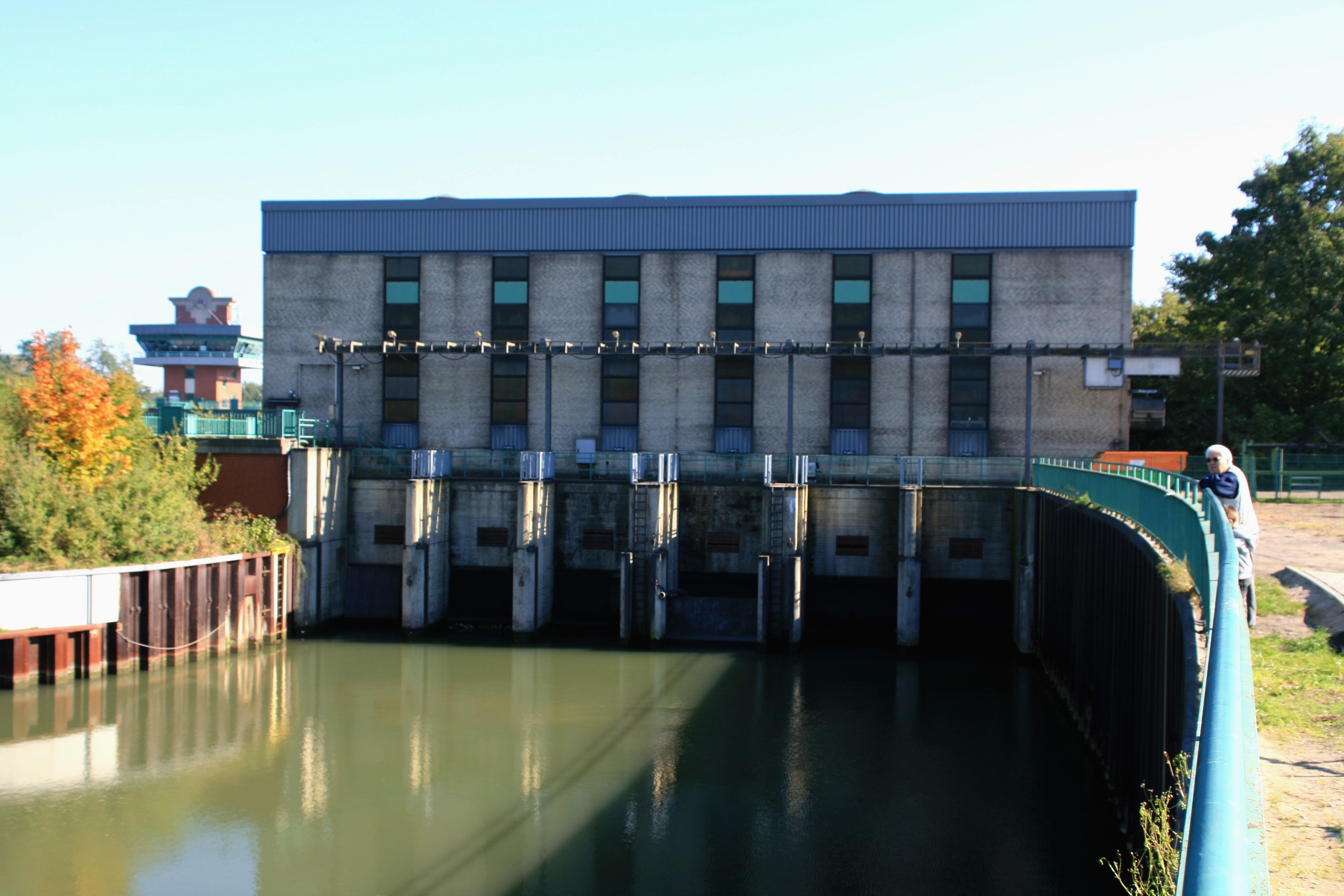 Pumpwerk der Schleuse Wanne-Eickel, Altcrange in Herne-Crange